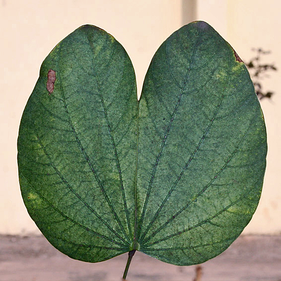 Hong Kong Orchid Tree Bauhinia Blakeana in Kolkata, West Bengal, India.